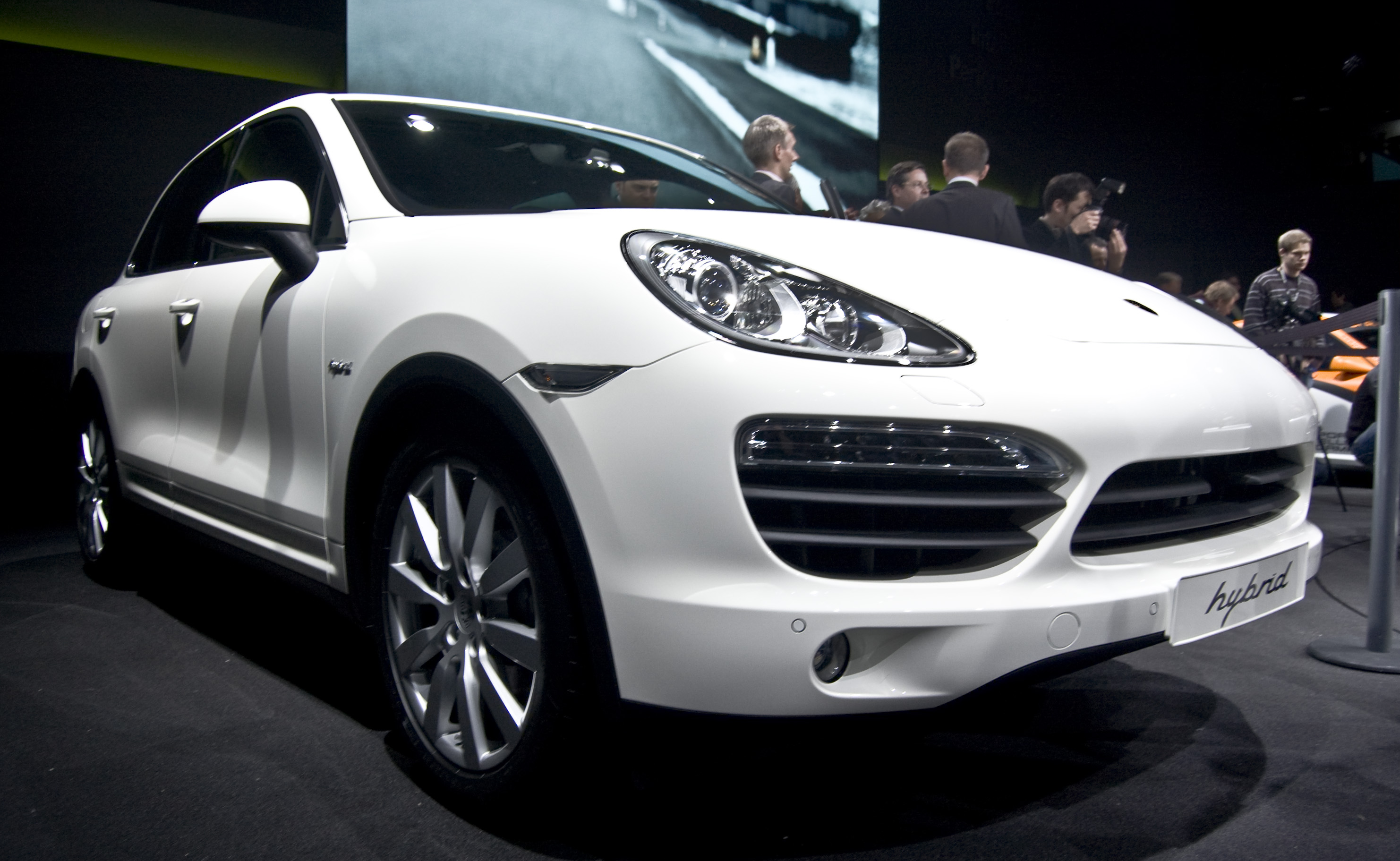 Porsche Cayenne Hybrid en el Salón de Ginebra 2010.